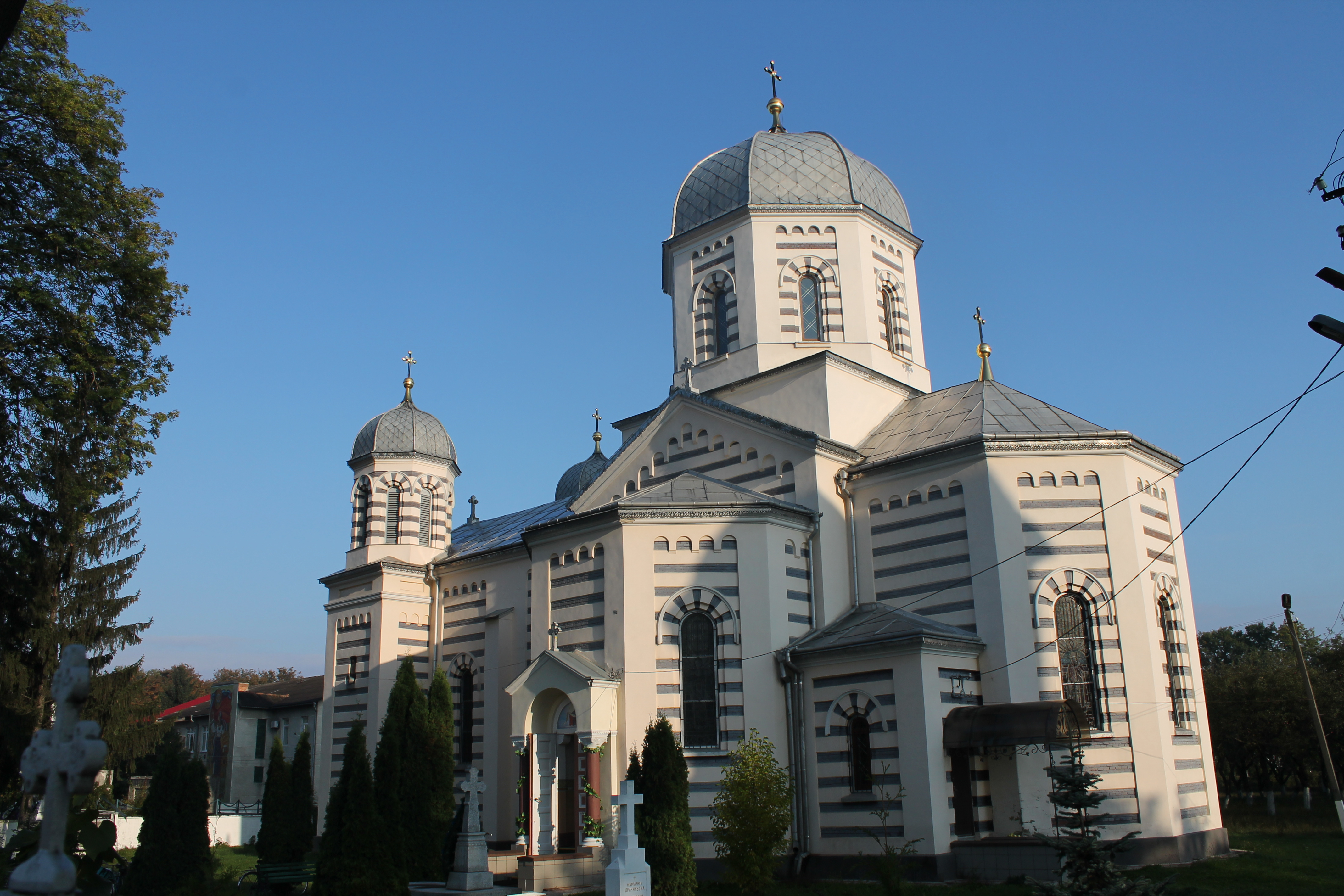 Церква Покрови (мур.), с. Мамаївці